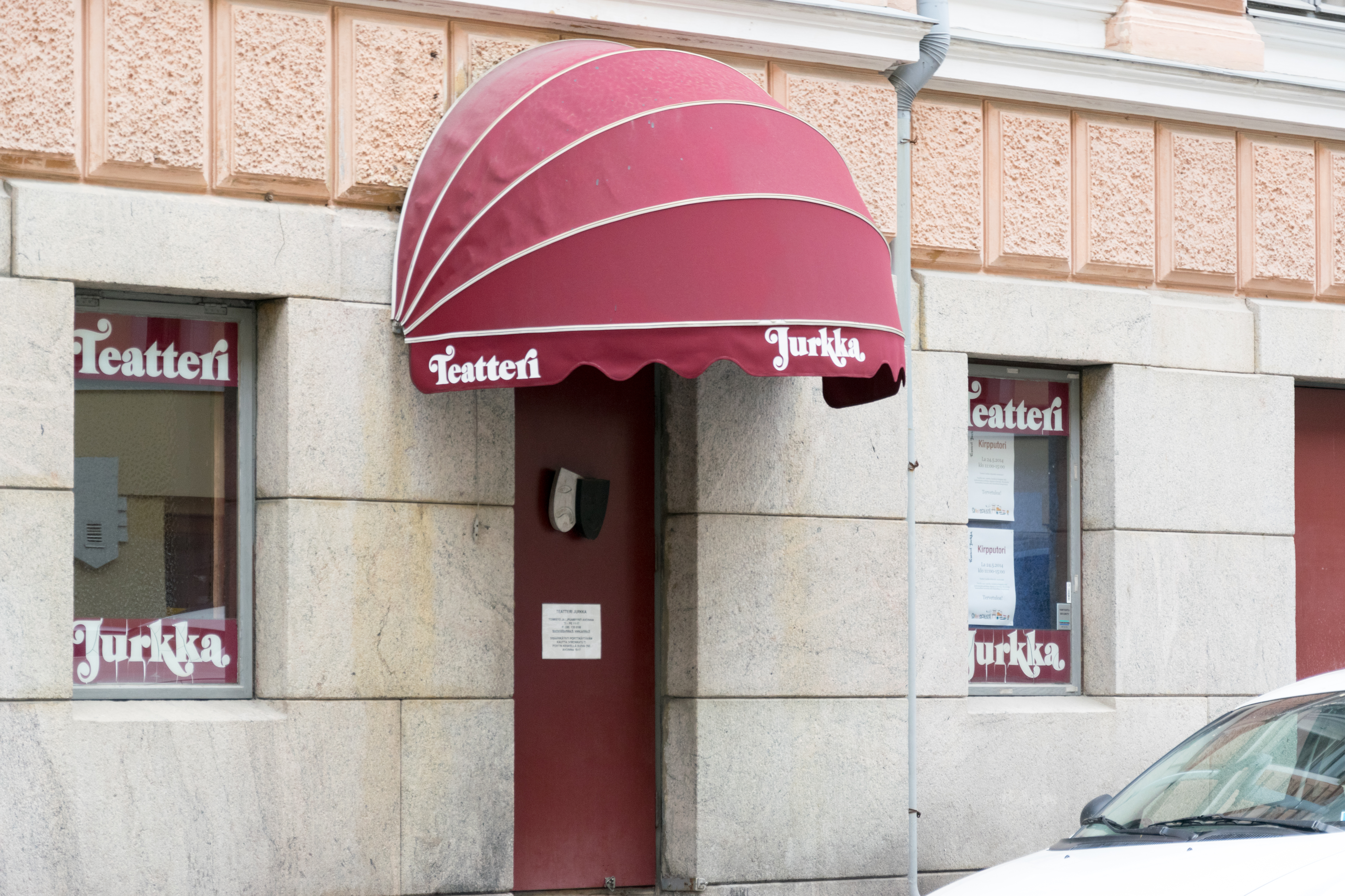 Teatteri Jurkka Helsingissä